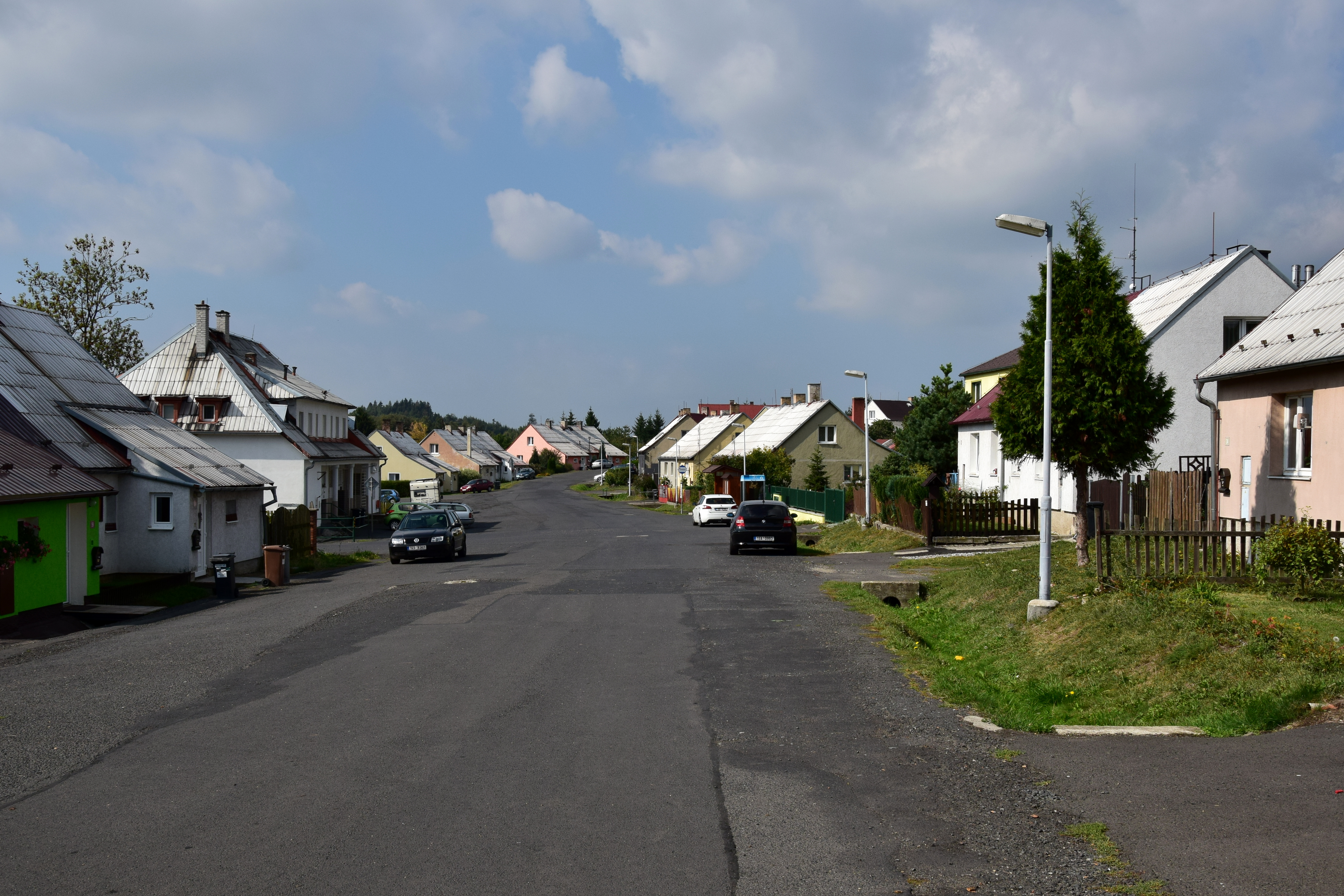 Bražec – východní část hlavní ulice